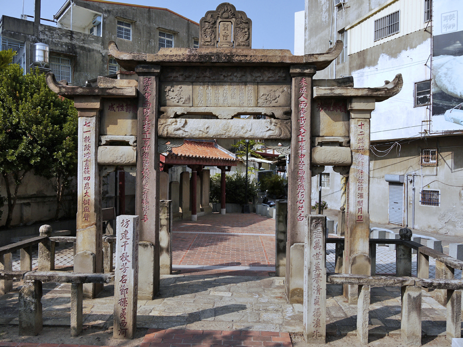 中文（台灣）: 大甲林氏貞孝坊。